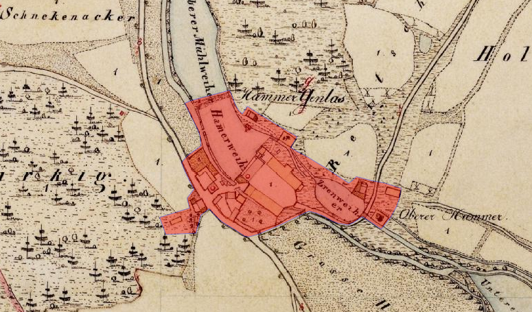 Lageplan von Hammer und Schloss Hammergänglas